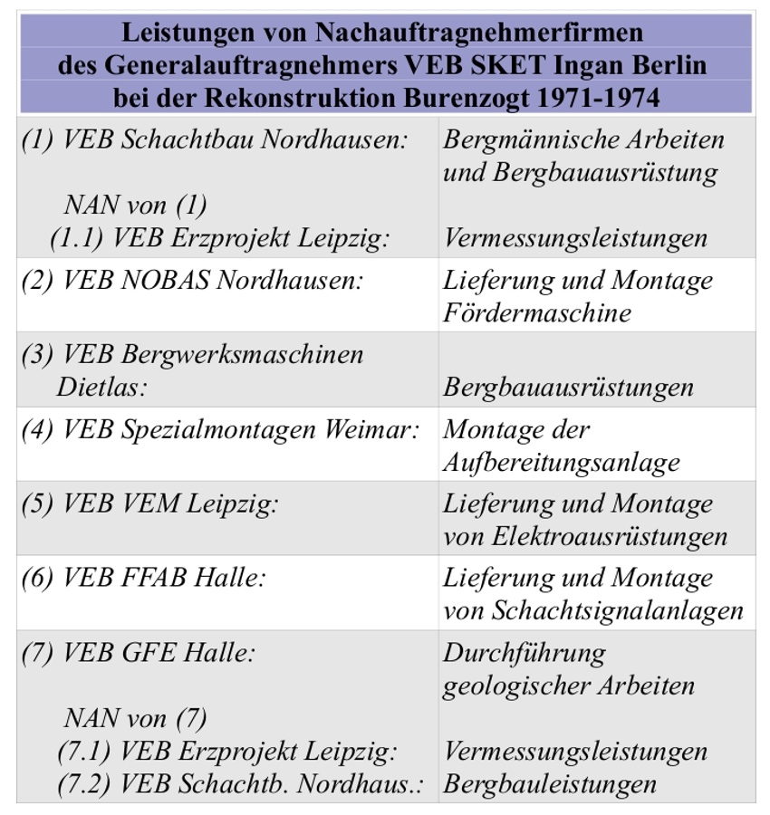 Leistungen von Nachauftragnehmerfirmen